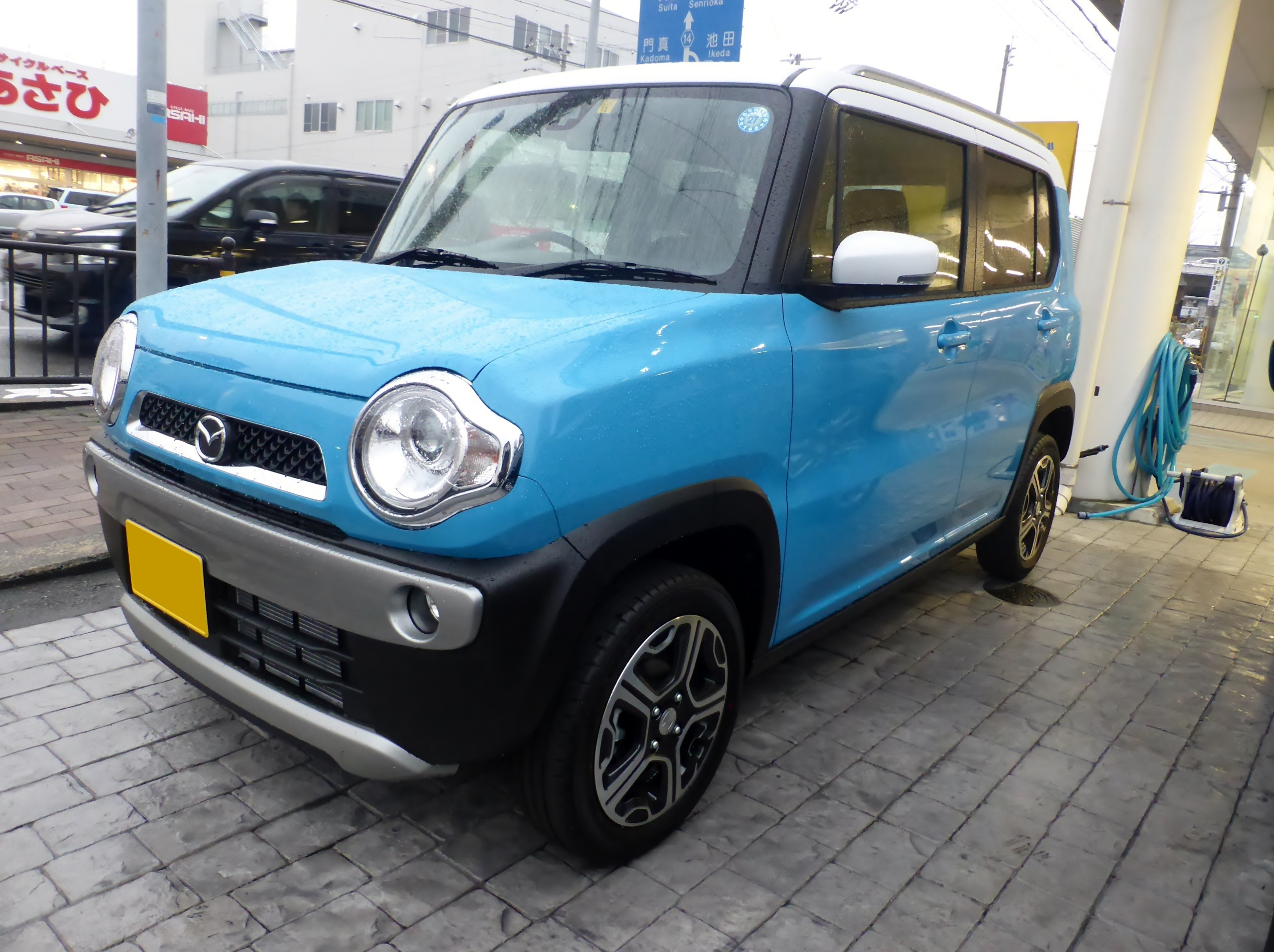 MS31S型マツダ・フレアクロスオーバーXSツートンカラーをフロントから撮影。